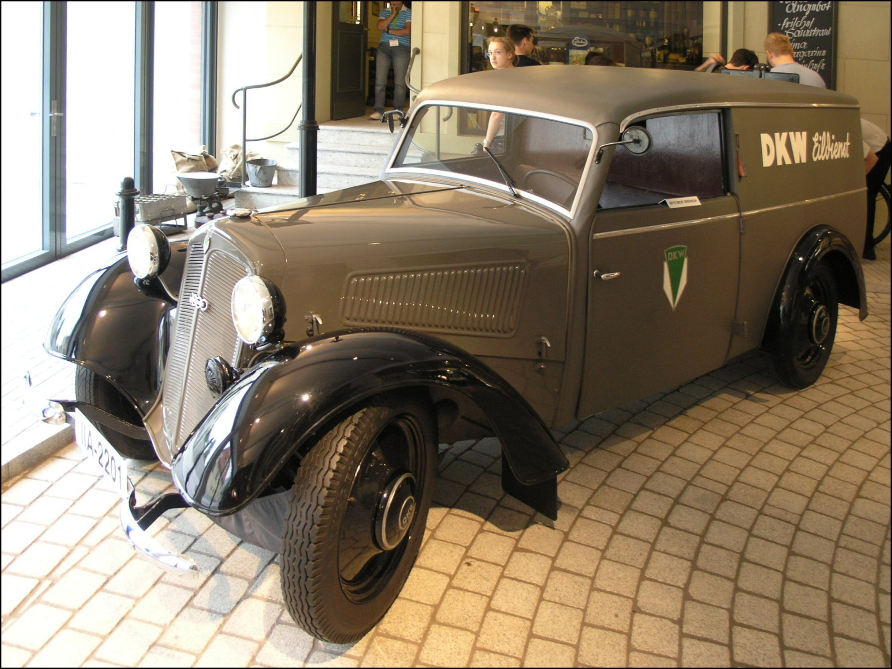 DKW